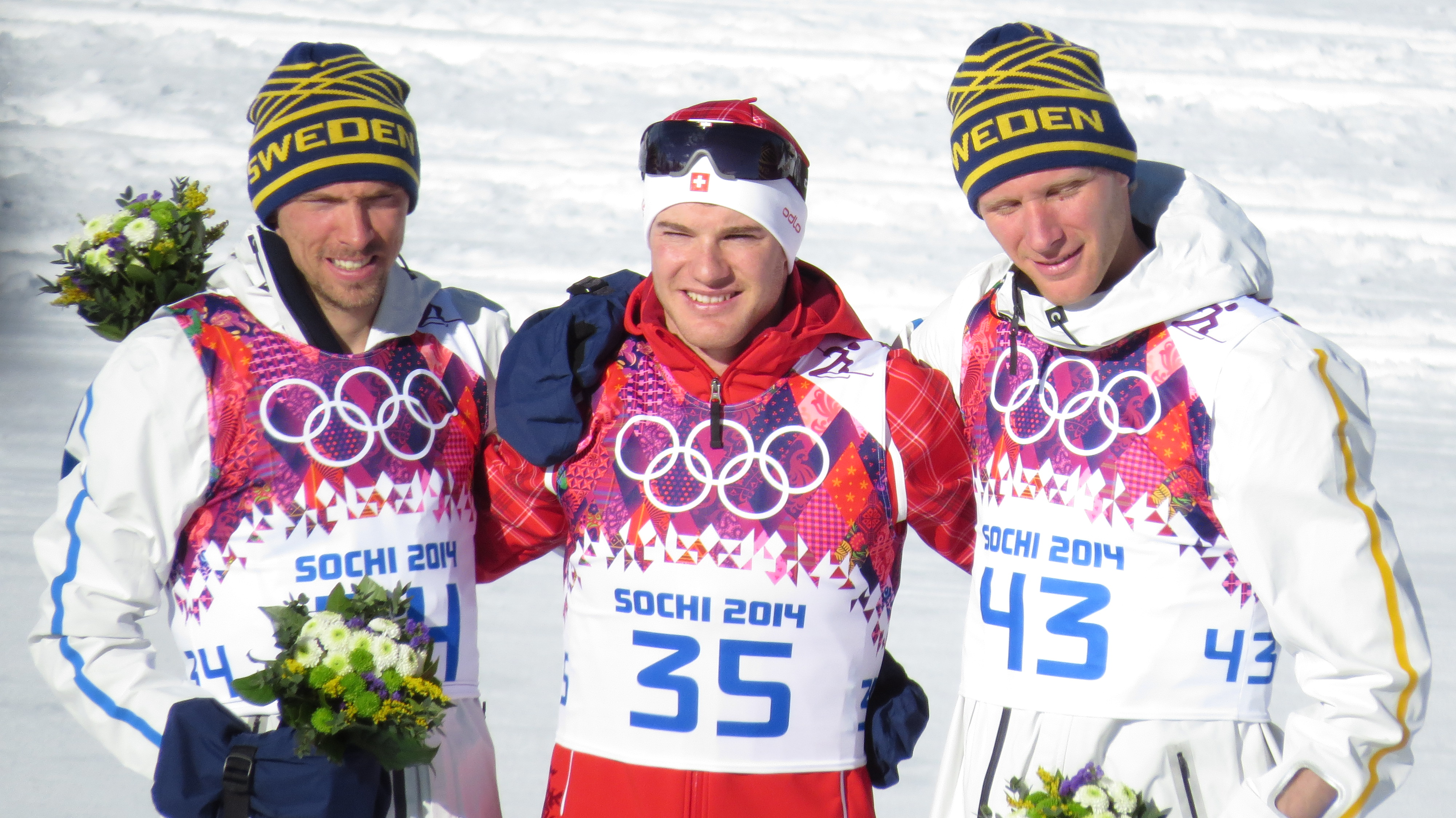 Лыжные гонки на зимних Олимпийских играх 2014 — 15 км классическим стилем (мужчины)